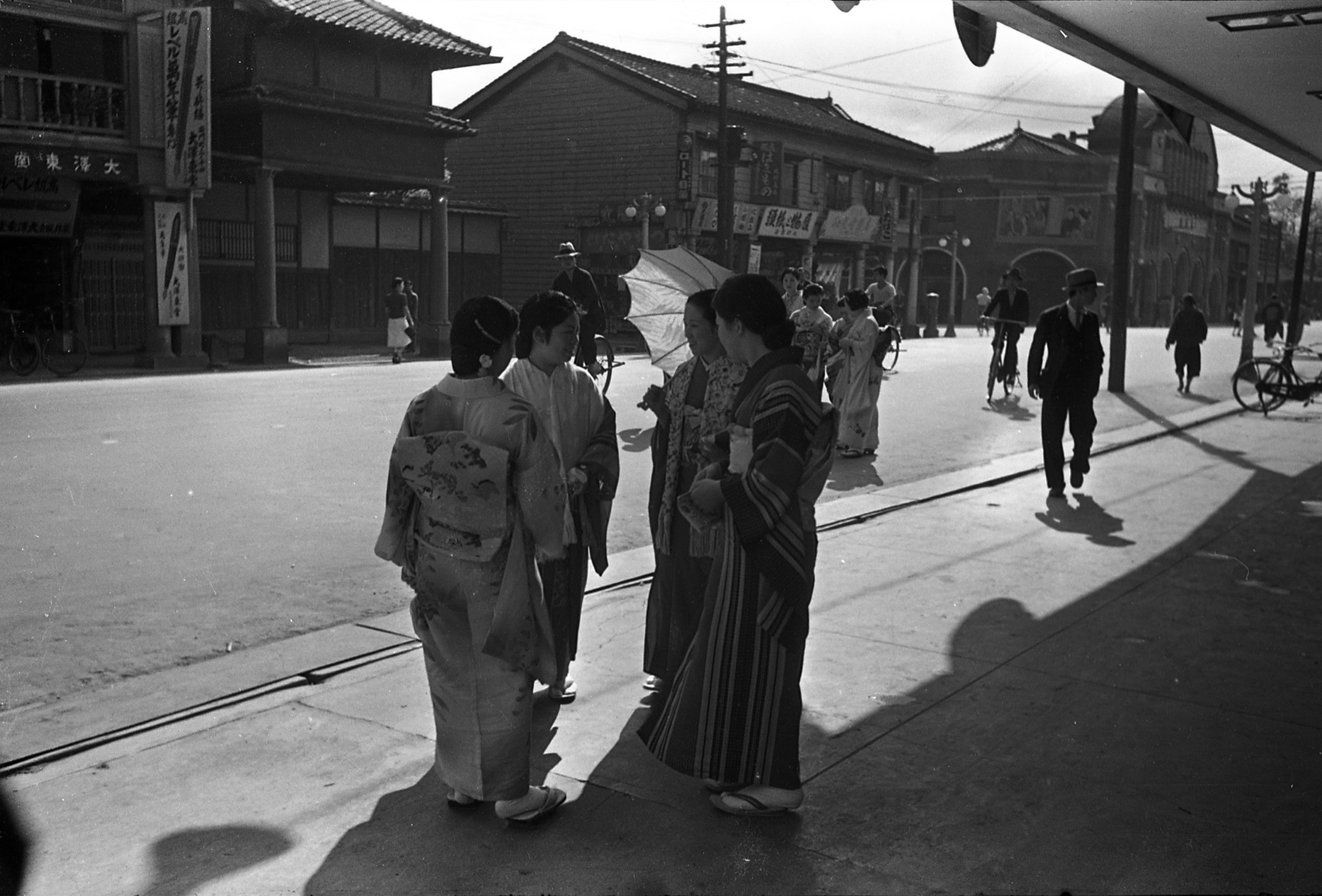 自西門橢圓公園望出街景。